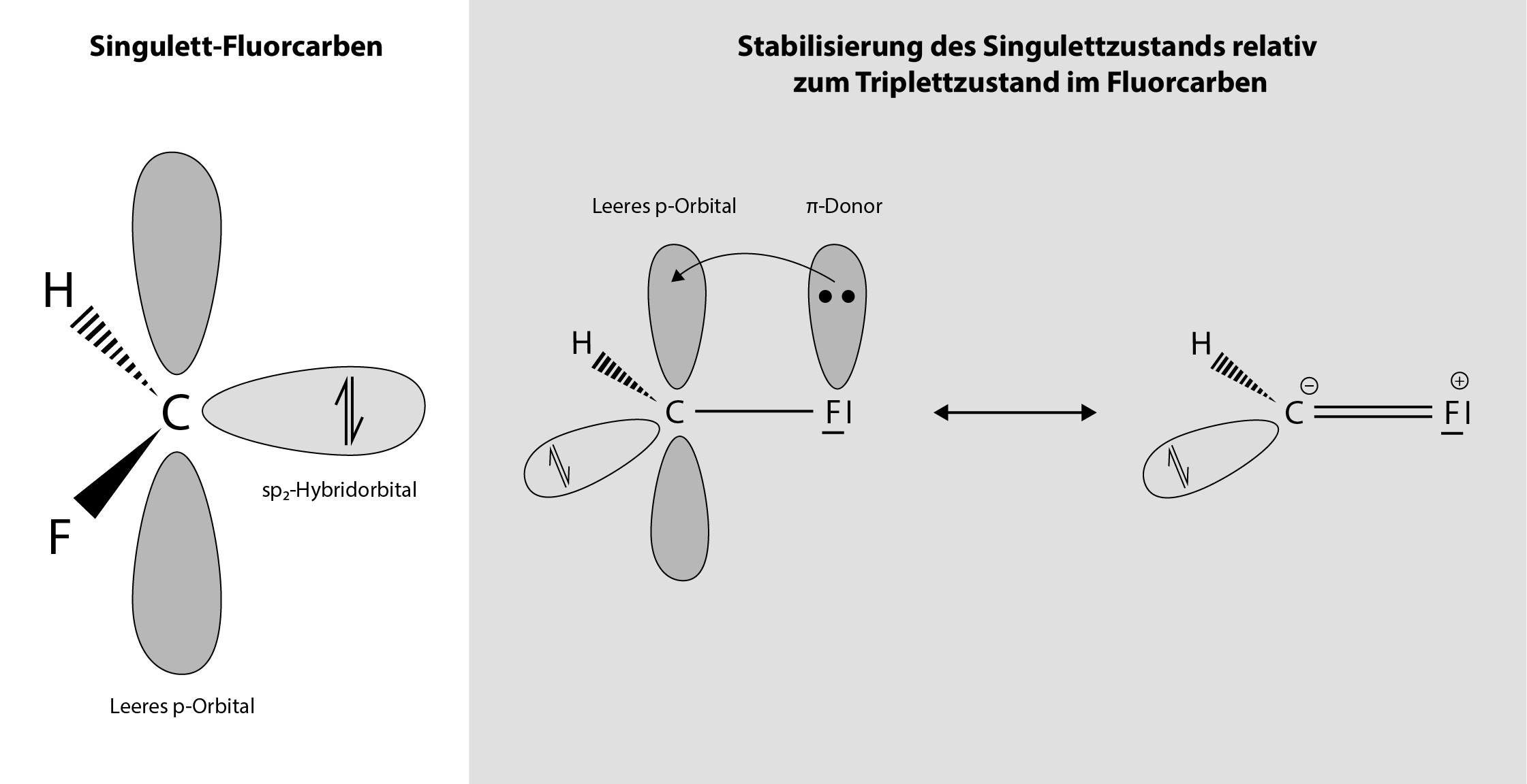 Stabilisierung des Singulettzustands relativ zum Triplettzustand im Fluorcarben. Dargestellt sind die beteiligten Orbitale und die Resonanzstruktur des HCF-Moleküls. In Carbenen ohne π-Donor ist kein π-MO-System vorhanden, so dass sich die beiden nichtbindenden Elektronen auf die beiden nichtbindenden Orbitalen am Kohlenstoffatom verteilen können. In diesem Fall führt das Vermeiden der doppelt Orbitalbesetzung zu einem Triplettcarben. Durch den π-Donor wird der Singulettzustand des Carbens stabilisiert, da die beiden nichtbindenden Elektronen (ohne Anregung) im energetisch tiefer liegenden sp₂-Hybridorbital verbleiben und sich nicht auf die antibindenden Molekülorbitale verteilen.